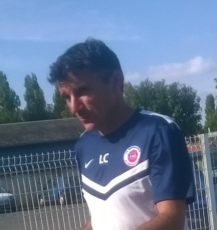 Photo de Laurent Cadu, alors directeur du centre de formation de LB Châteauroux